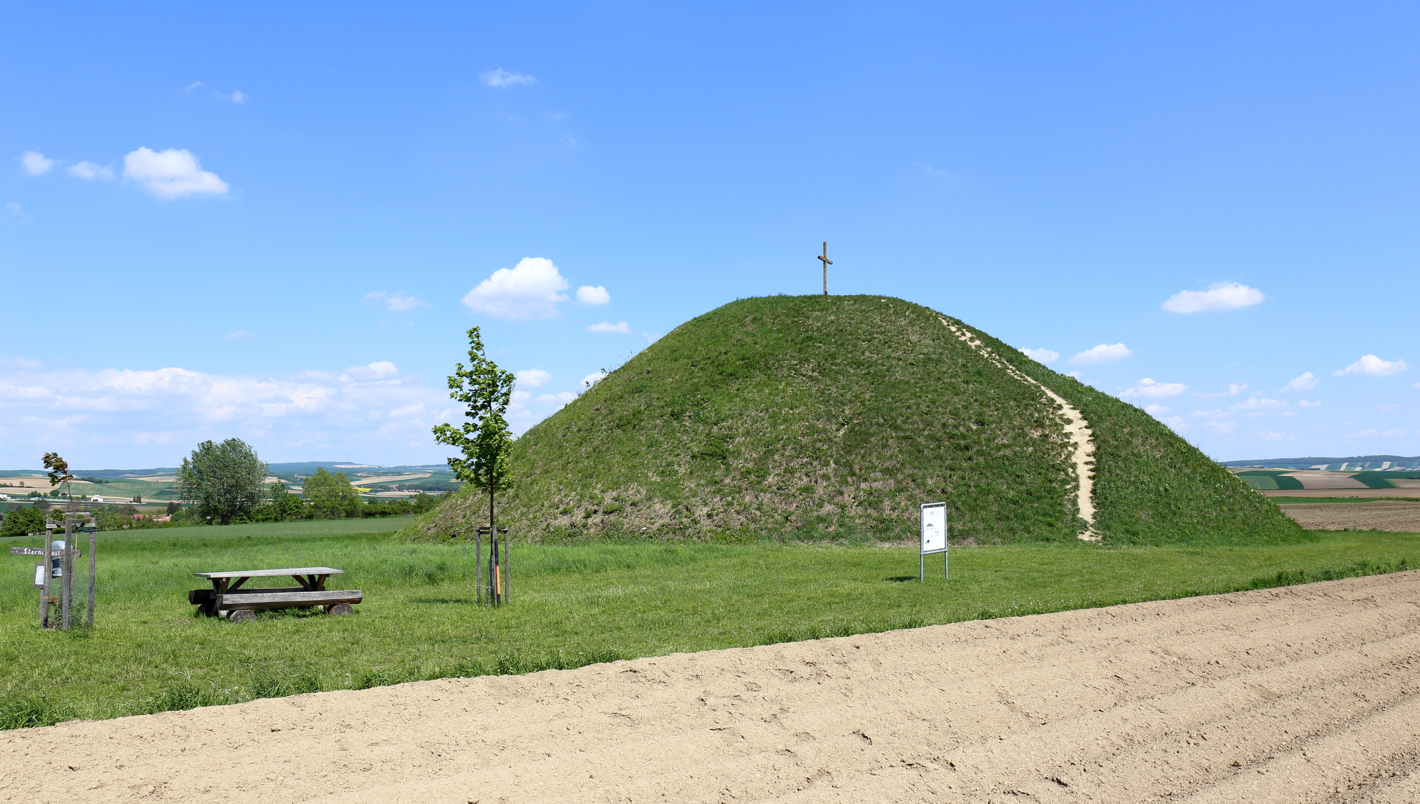 Hügelgrab bzw. Grabhügel (Tumulus), auch Leeberg von Großmugl bezeichnet, in der niederösterreichischen Marktgemeinde Großmugl.Der Tumulus wurde während der Hallstattzeit (800 bis 450 v. Chr.) aufgeschüttet und ist mit einem Durchmesser von rd. 50 Meter und einer Höhe von etwa 14 Meter einer der Größten in Mitteleuropa. Das Hügelgrab ist auch namensgebend für den Ort Großmugl: «großer Mugl» (Hügel).